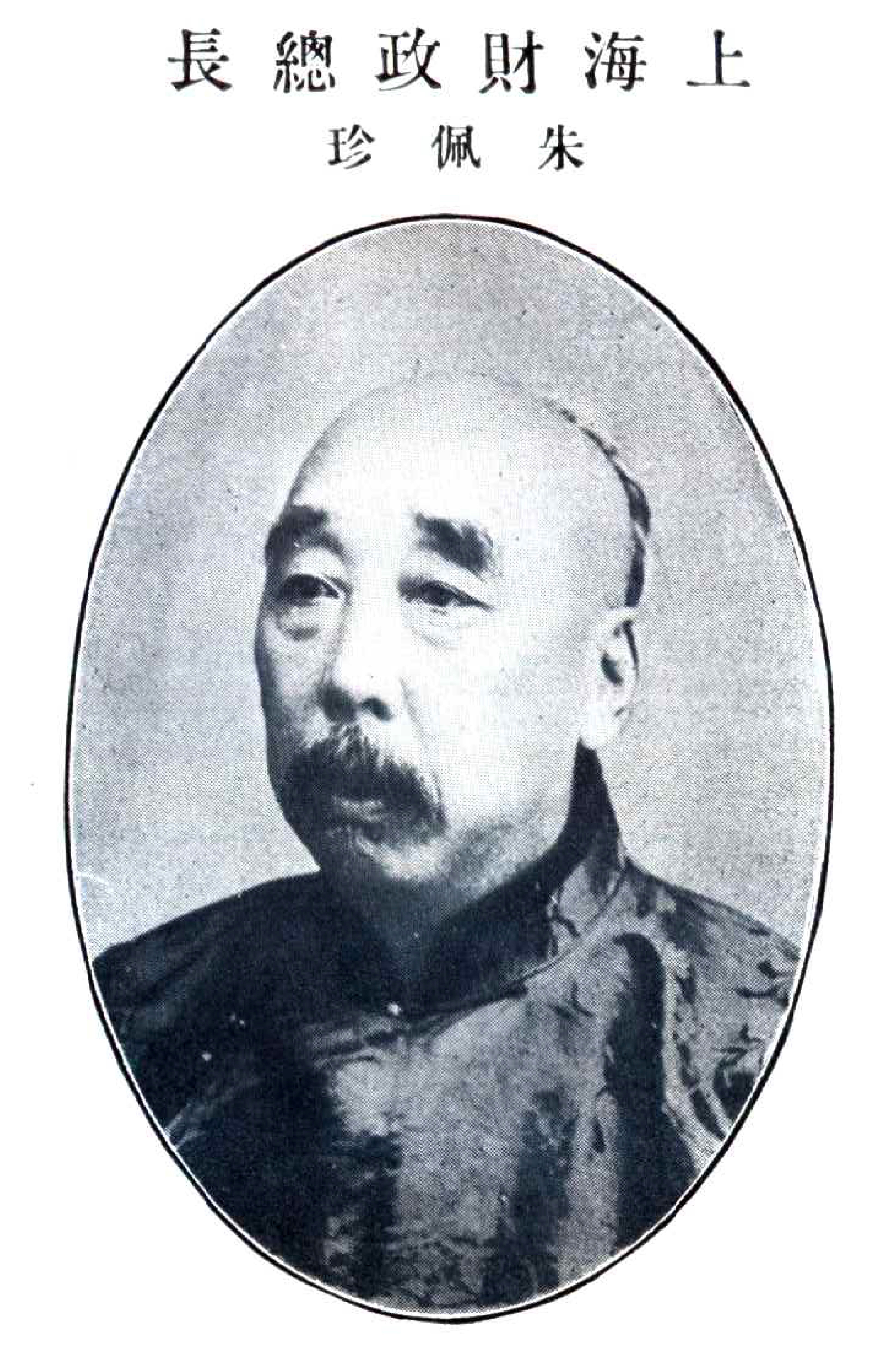 上海工商界领袖、上海总商会会长,朱葆三